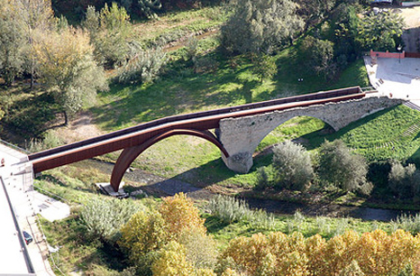 El Pont Trencat de Sant Celoni (Catalunya).